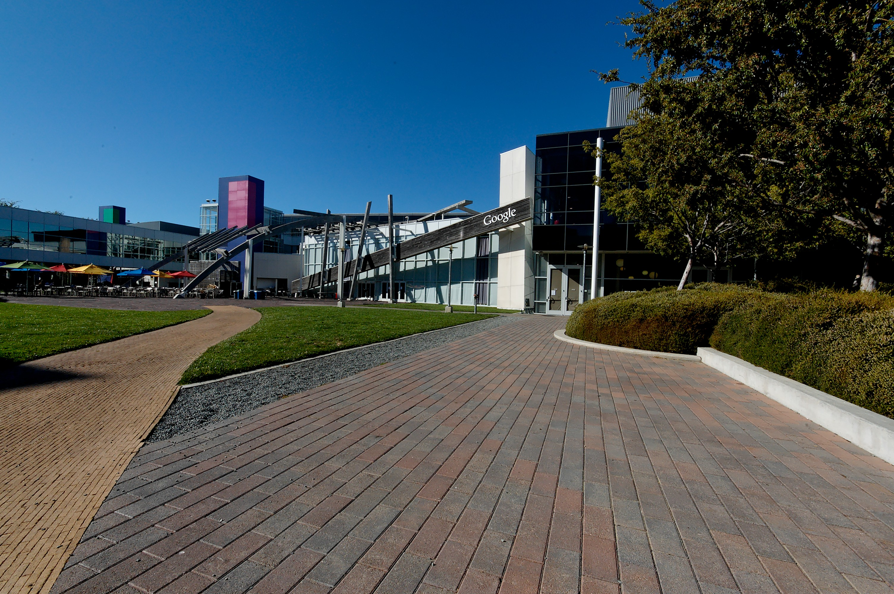 Google Campus